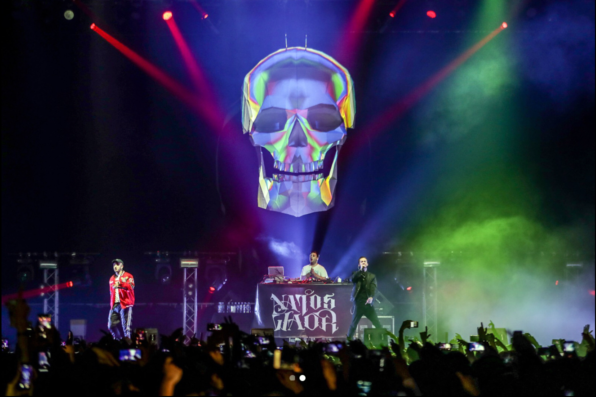 Natos (izquierda) y Waor (derecha) en uno de sus conciertos